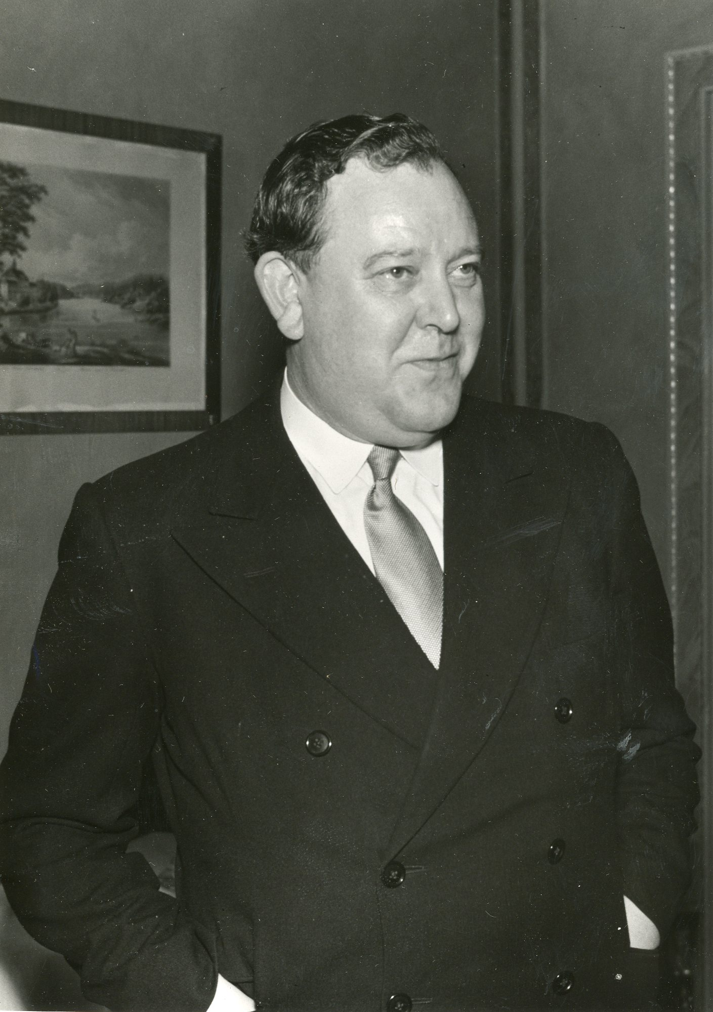 Utenriksminister Trygve Lie i Sverige. Under sitt besøk i Sverige i oktober-november 1944 arrangerte utenriksminister Trygve Lie på Grand Hotel i Stockholm en lunch, hvori deltok medlemmer av den svenske regjering, Norges og allierte nasjoners sendemenn i Sverige, fremstående norske og svenske militære sjefer o.a. Utenriksminister Trygve Lie ankom til Stockholm natt til 29. oktober 1944 sammen med justisminister Terje Wold, medisinaldirektør Karl Evang og to sekretærer. Besøket skjedde etter innbydelse av Sveriges utenriksminister Günther. Bildet viser utenriksminister Trygve Lie fotografert under lunsjen. Pa-1209, Serie Uc_66 Administrasjonen II